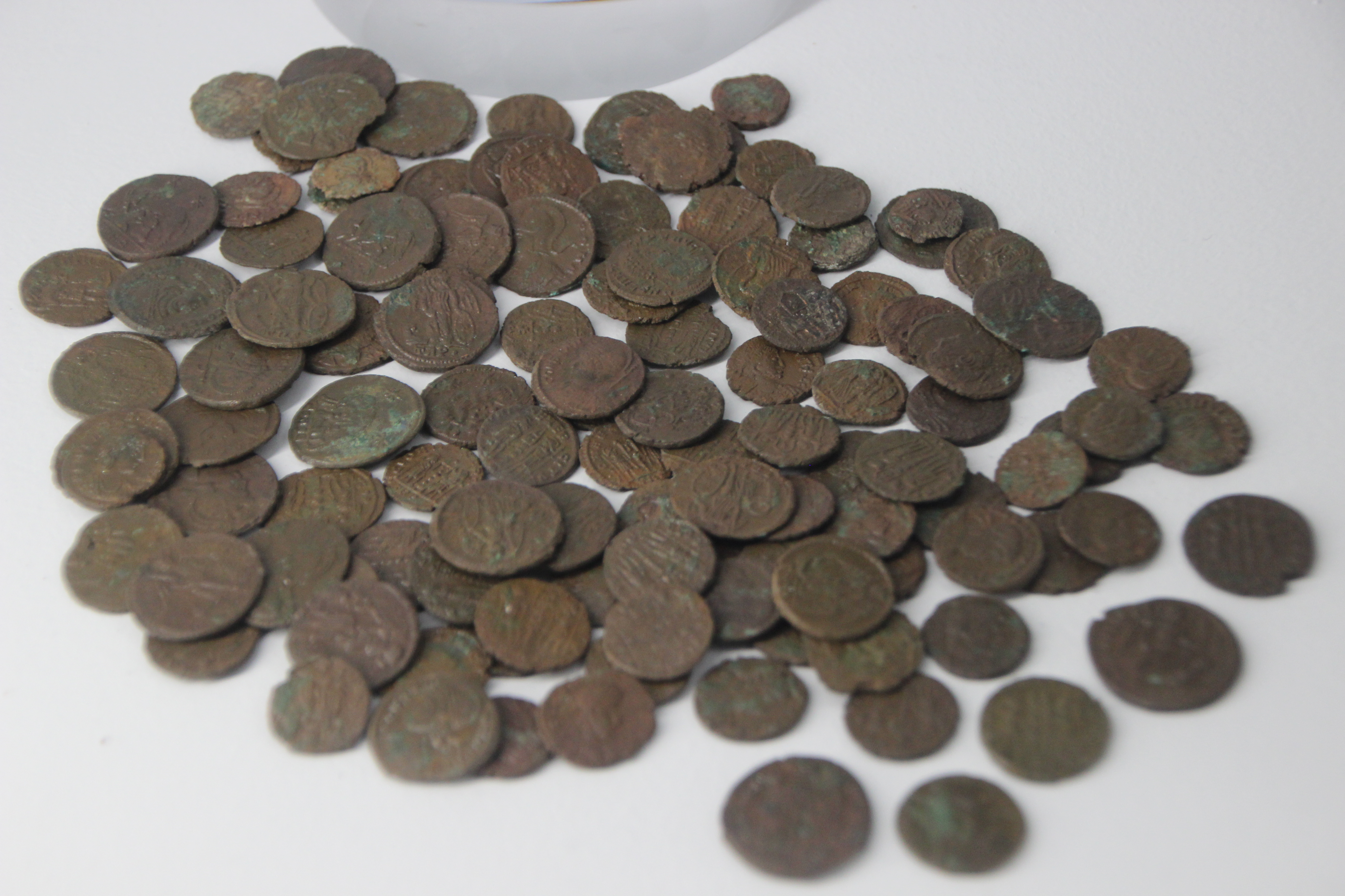 Trésor de Saint-Germain-de-Varreville au Musée de Normandie à Caen (3)